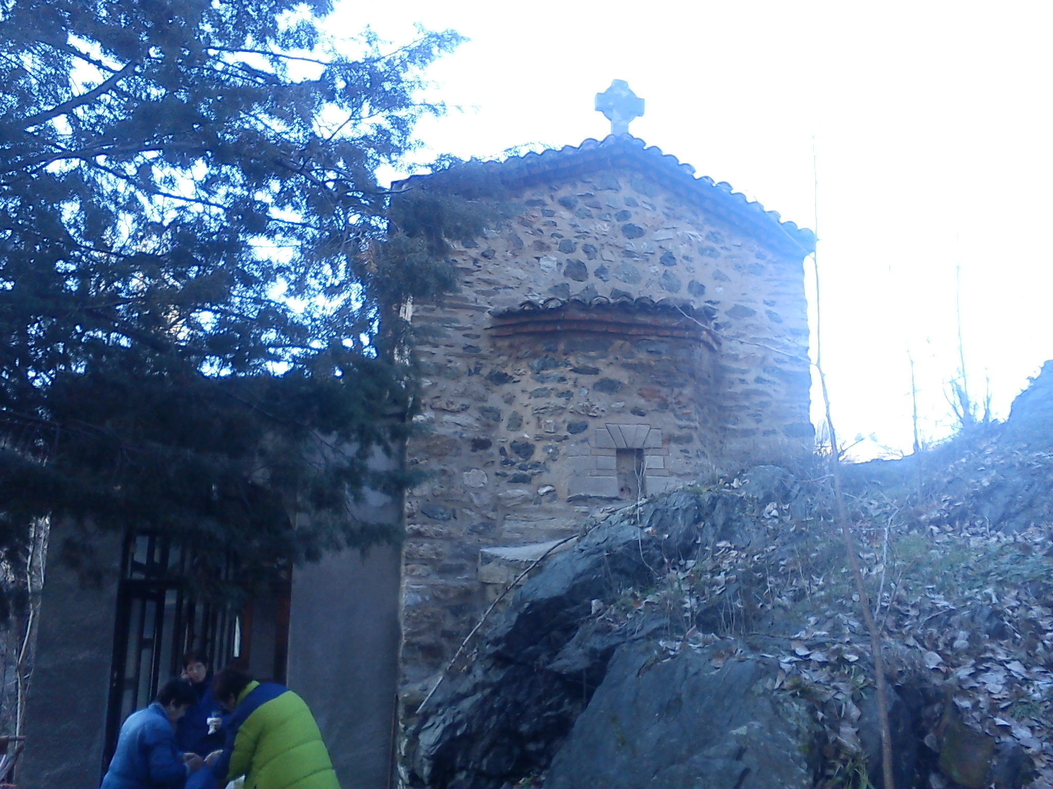 Средновековната црква Св. Јован Крстител (Маркова меана) во Велес